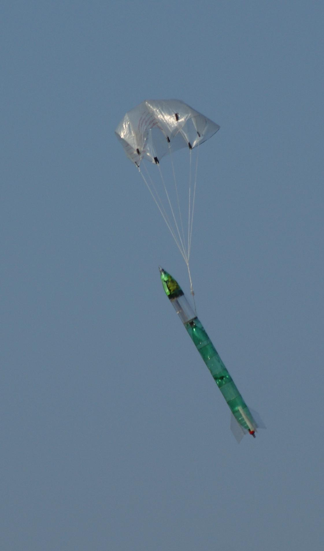 Razzo portato verso il suolo dal suo paracadute